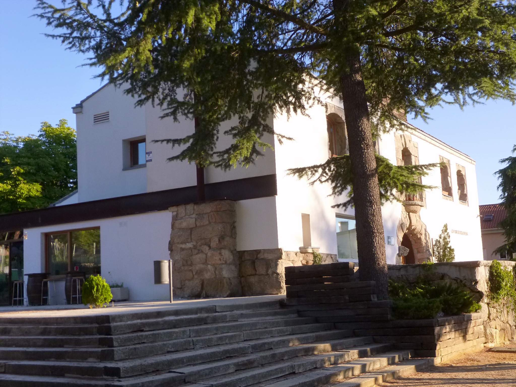 Centro Cultural Peñalba (Collado Villalba, Madrid)